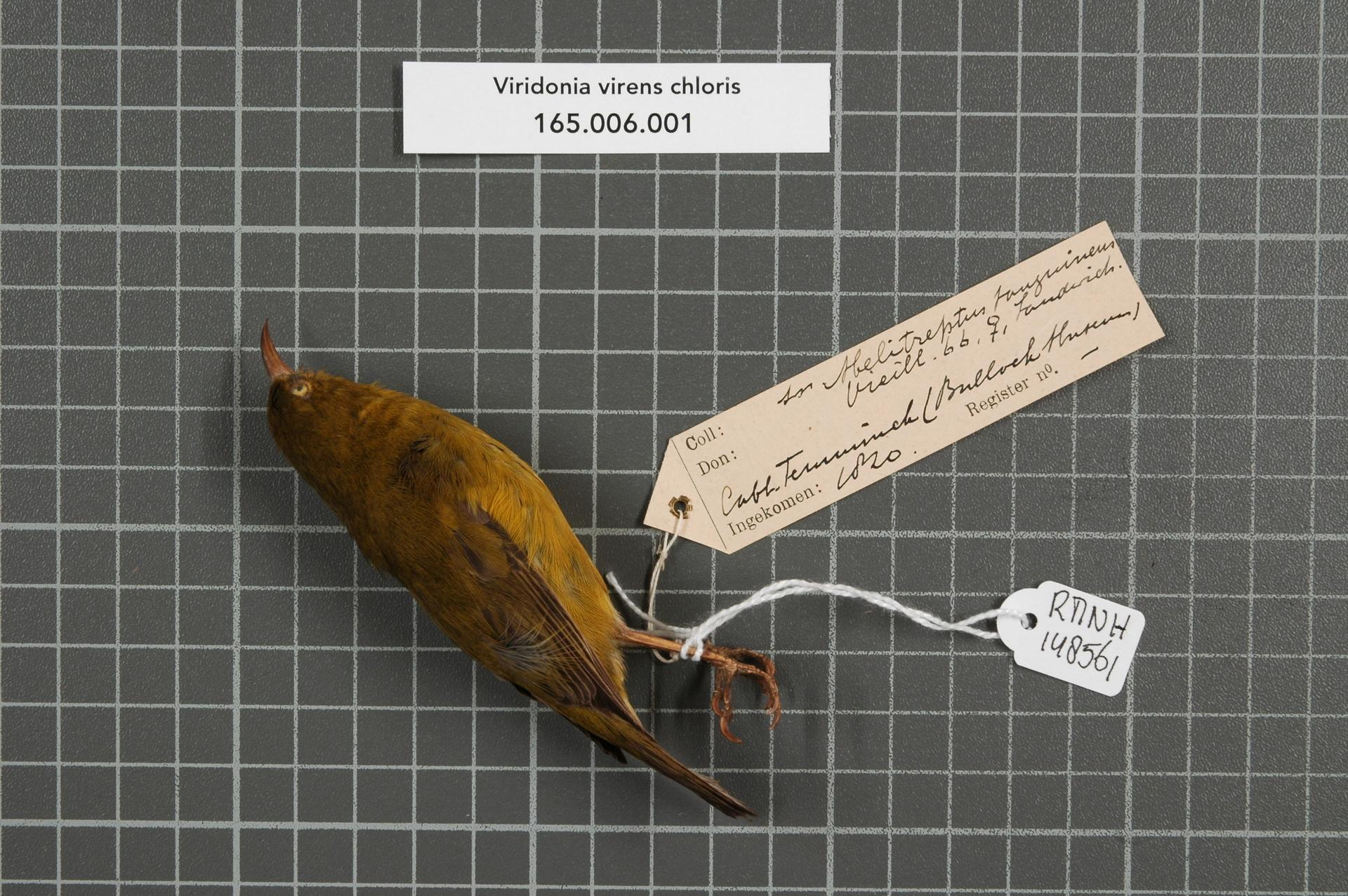 Viridonia virens chloris (Cabanis, 1851)